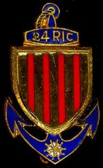 insigne régimentaire du 24 régiment d'infanterie coloniale.